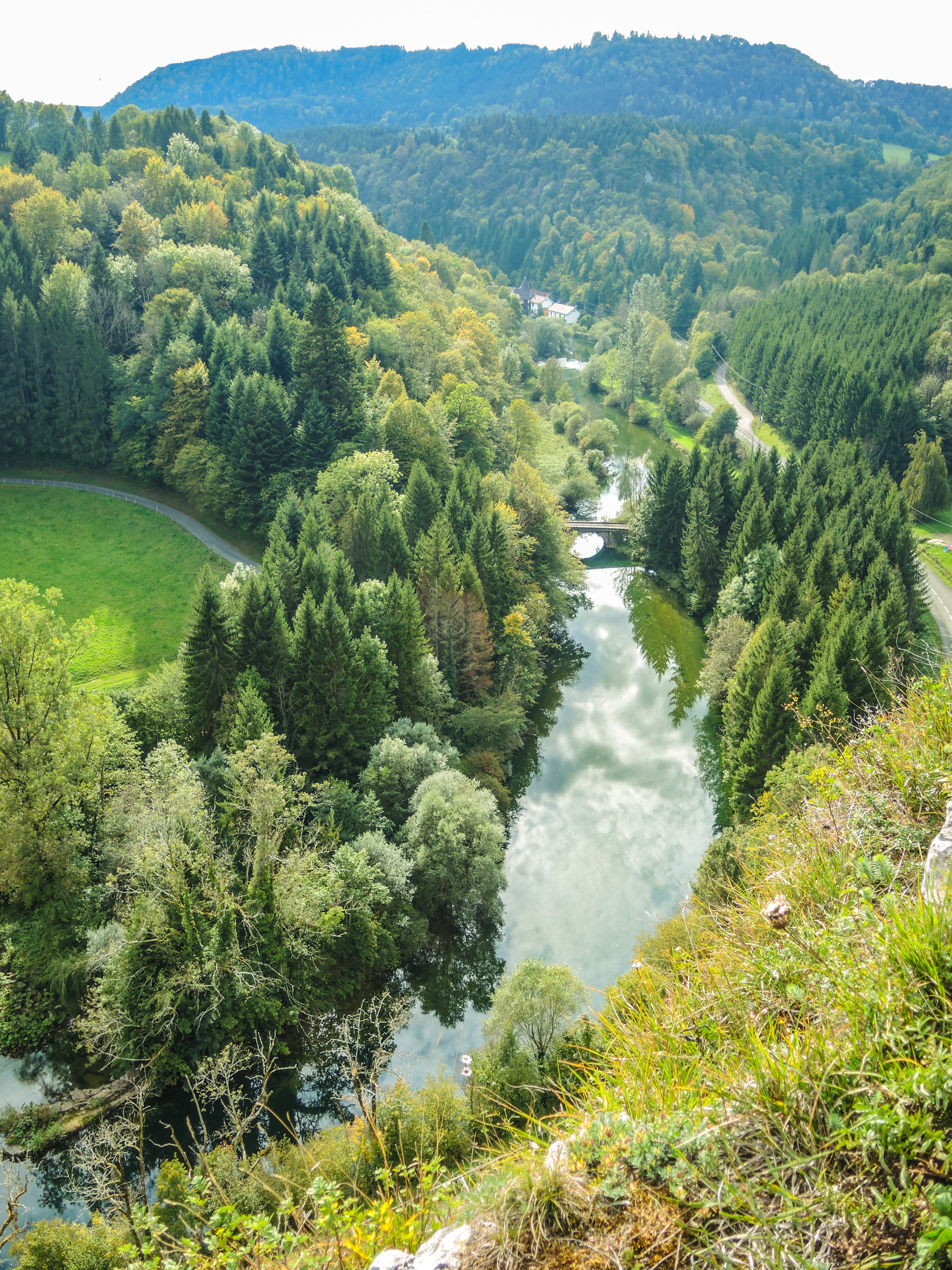 Vue sur le Dessoubre, depuis le belvédère du Baron. Cour-Saint-Maurice. Doubs